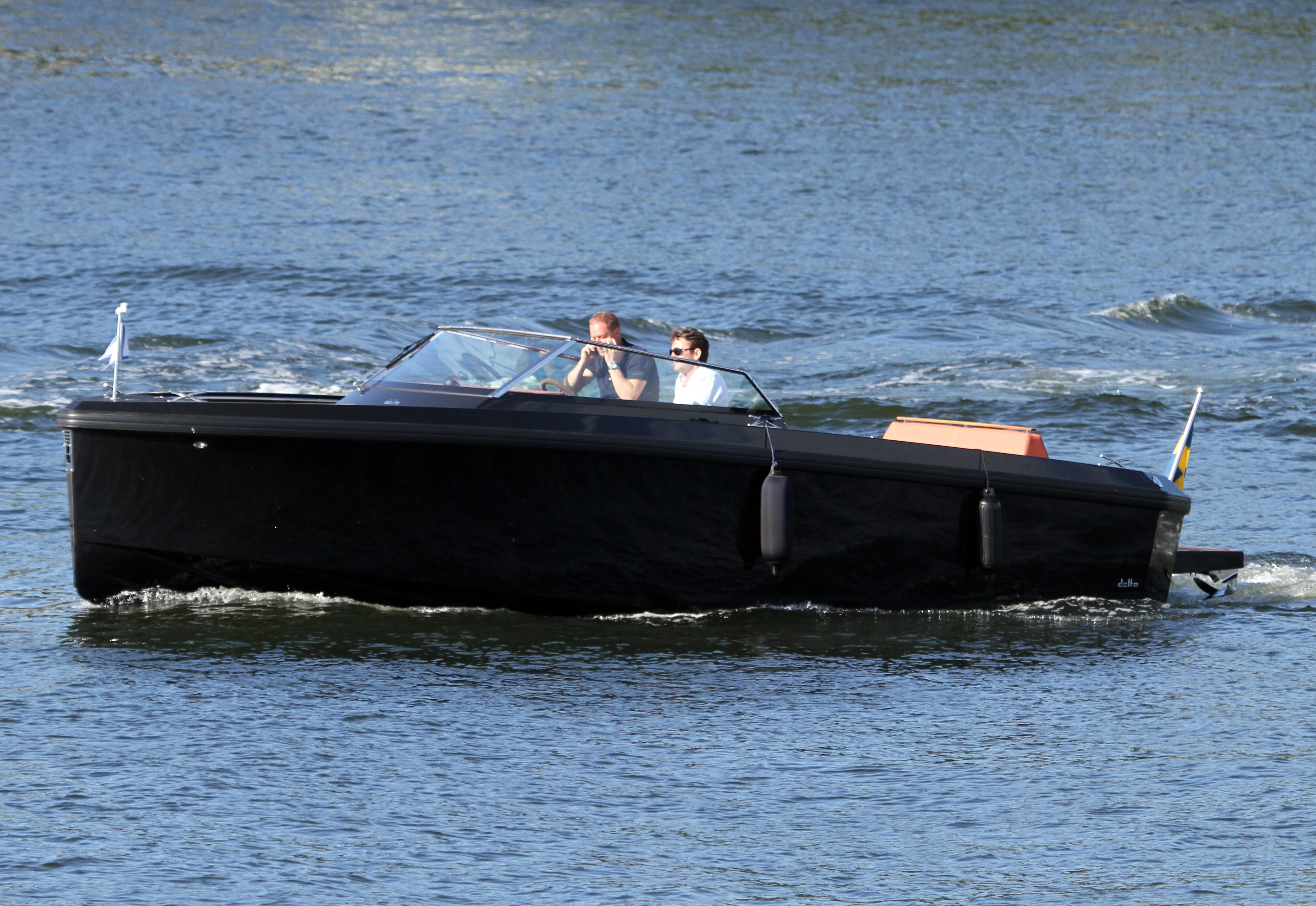 Delta 33 Open på Norra Vaxholmsfjärden 4 augusti 2015